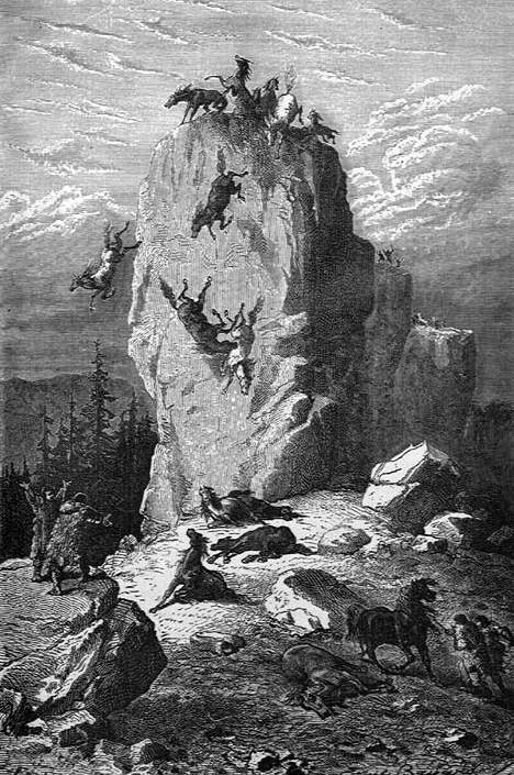 La chasse au cheval à Solutré, d'après une illustration de "L'Homme primitif" de Louis Figuier, édition de 1876. Illustration complémentaire à la légende développée par Adrien Arcelin (Cranile).